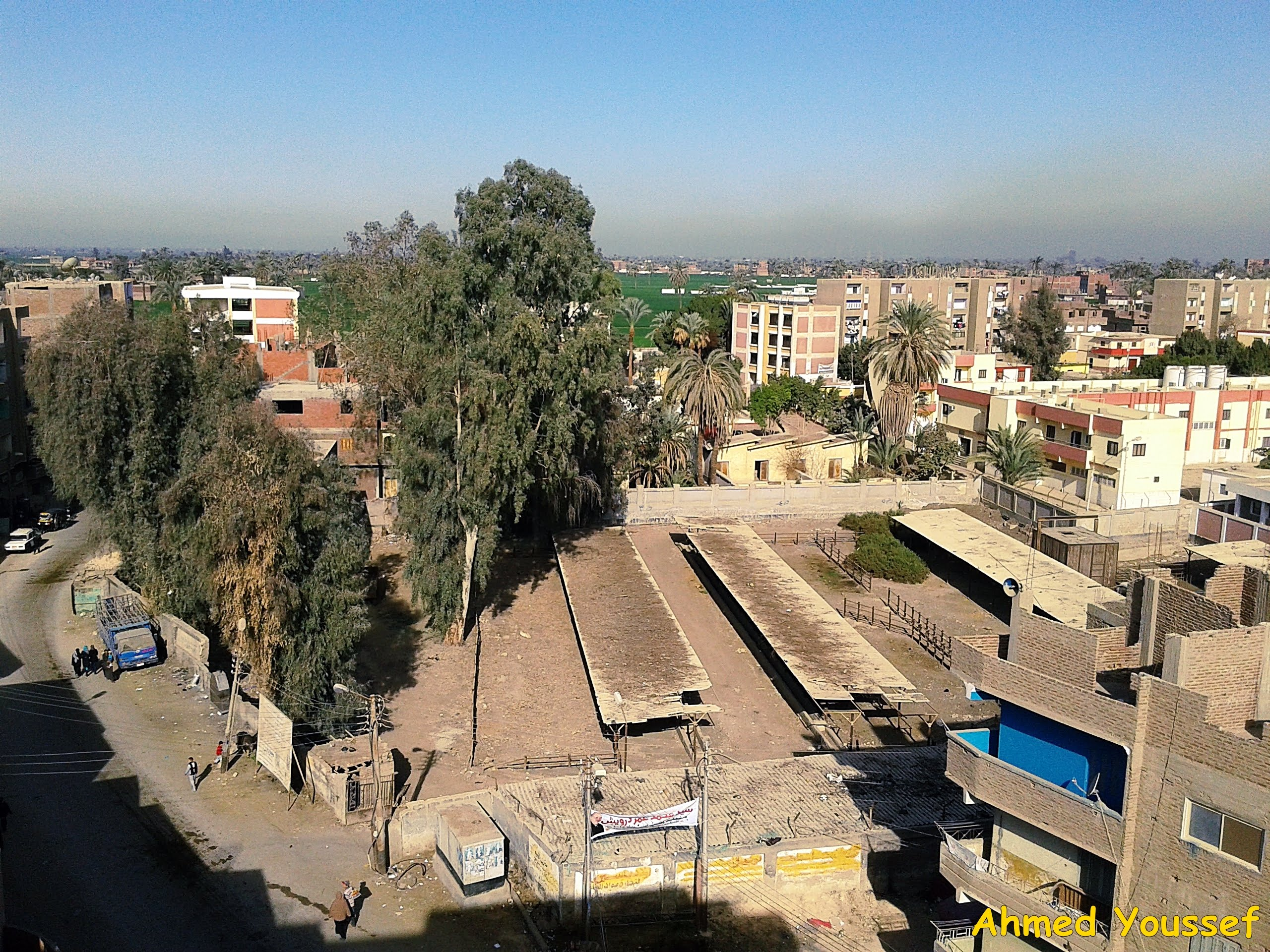 Manqabad - منقباد